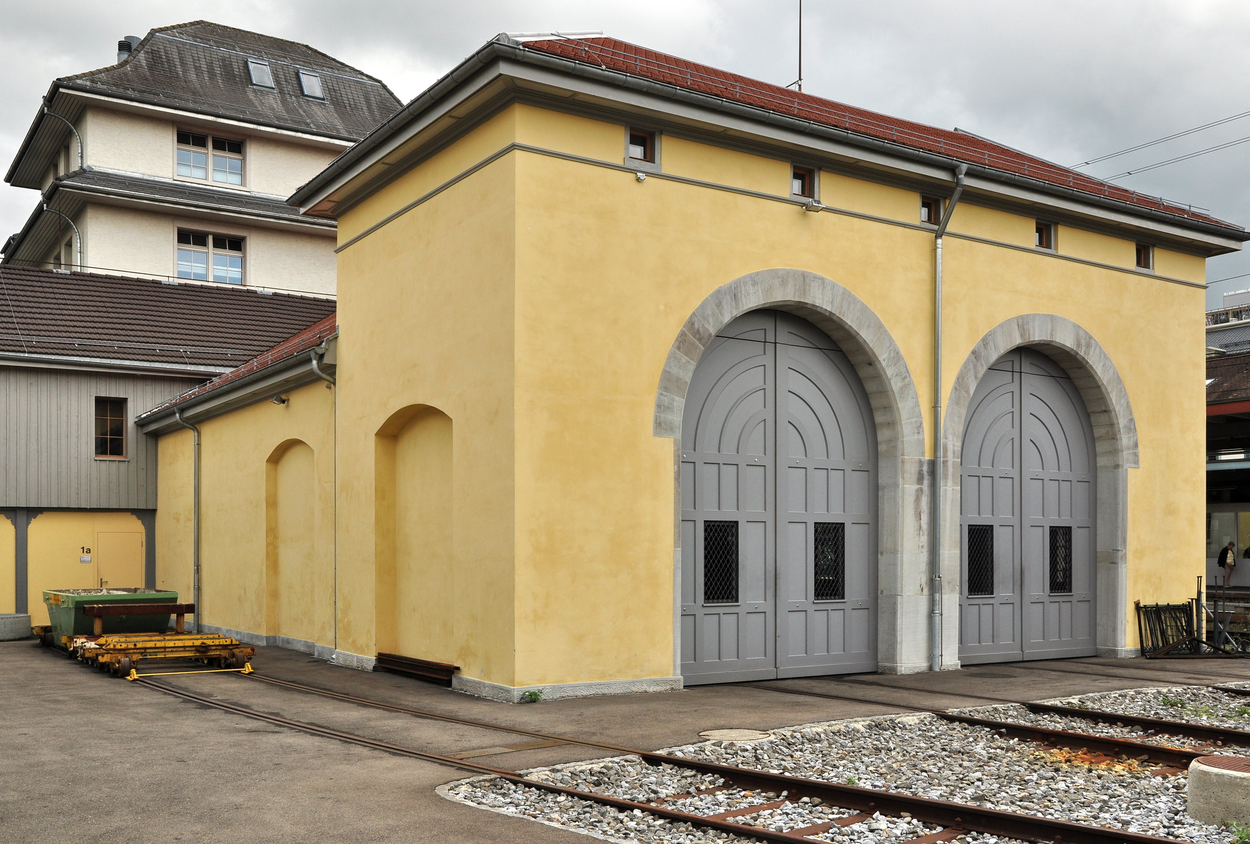 Bahnhof mit zwei Lok-Remisen in Uster (Switzerland)